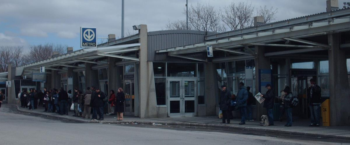 Entrance to Montreal Metro Henri Bourassa